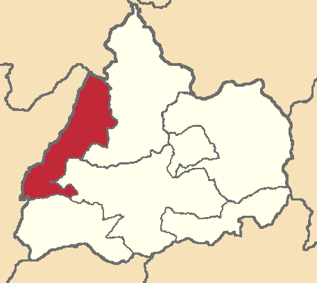 Mapa localizador del cantón en Cotopaxi, Ecuador